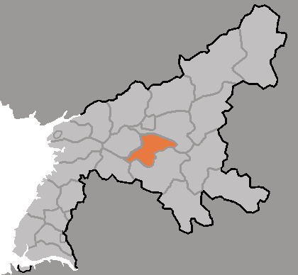 Map of Unsan, Pyongan-namdo, DPRK, 2006